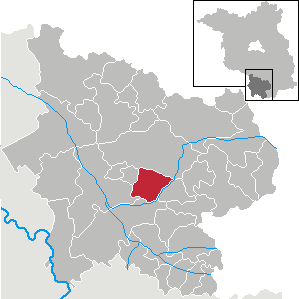 Schönborn in Brandenburg (Country) - District Elbe-Elster